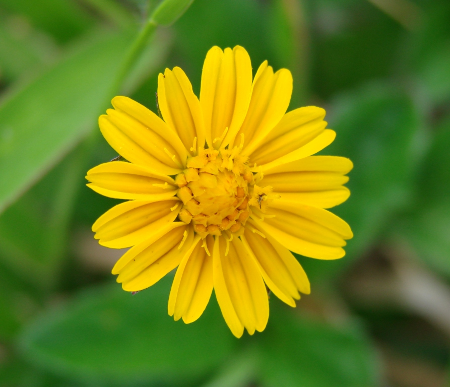 Sphagneticola trilobata - ASTERACEAE Parque Vivencial II Lago Norte - Brasília - Distrito Federal - Brasil.